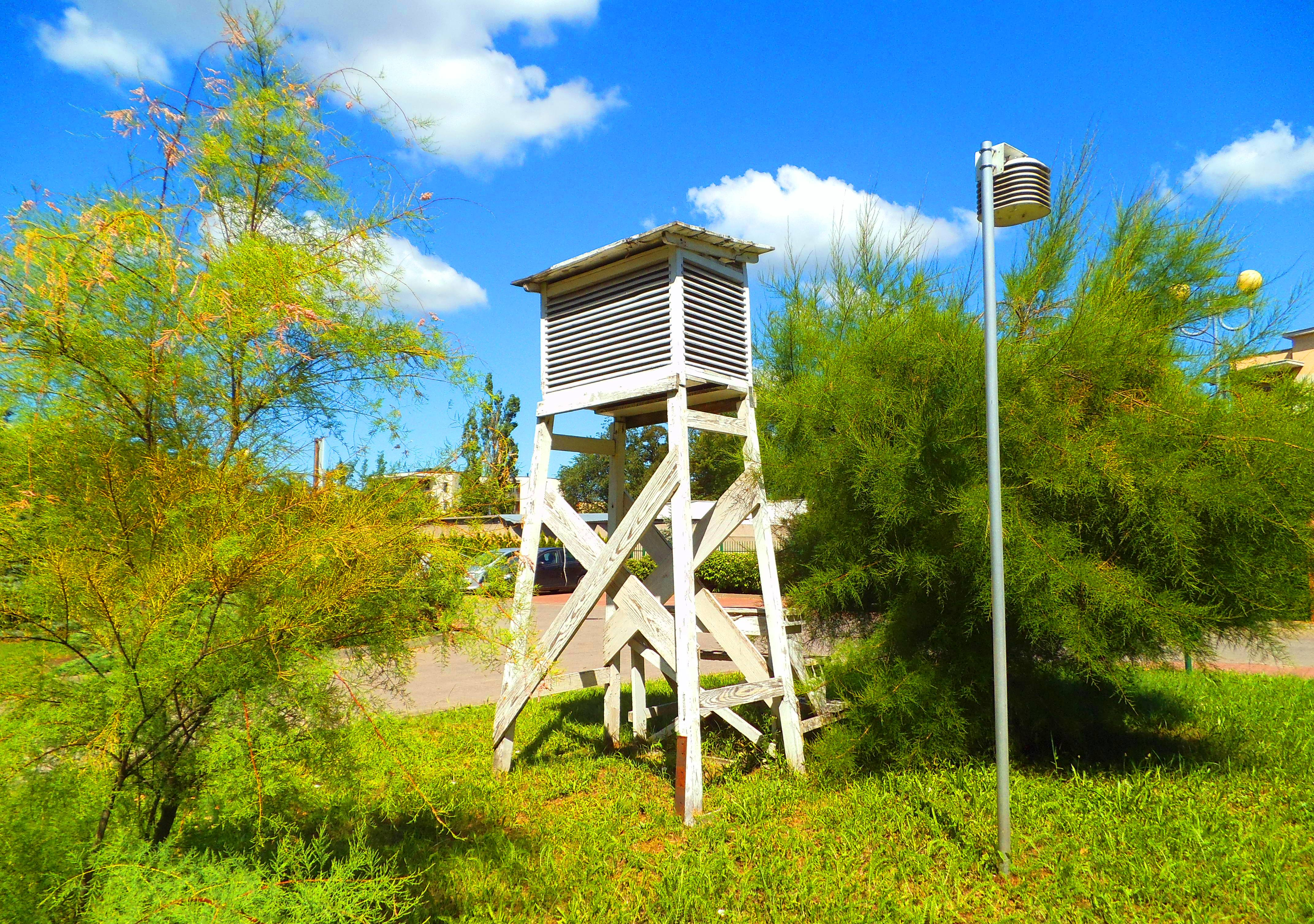 Szkolny ogródek meteorologiczny, Toruń